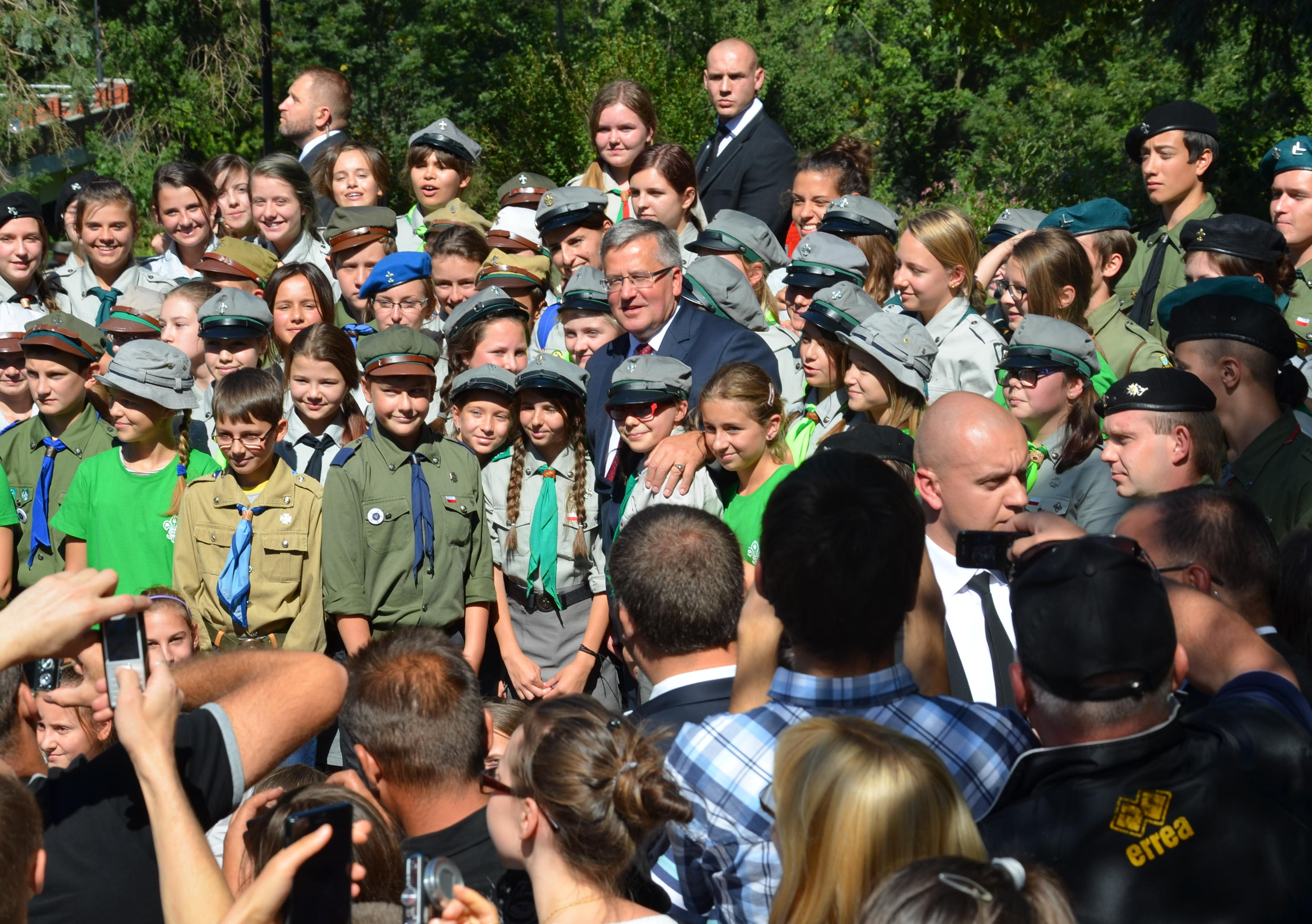 Präsident Komorowski zu Besuch in Sanok (2013)